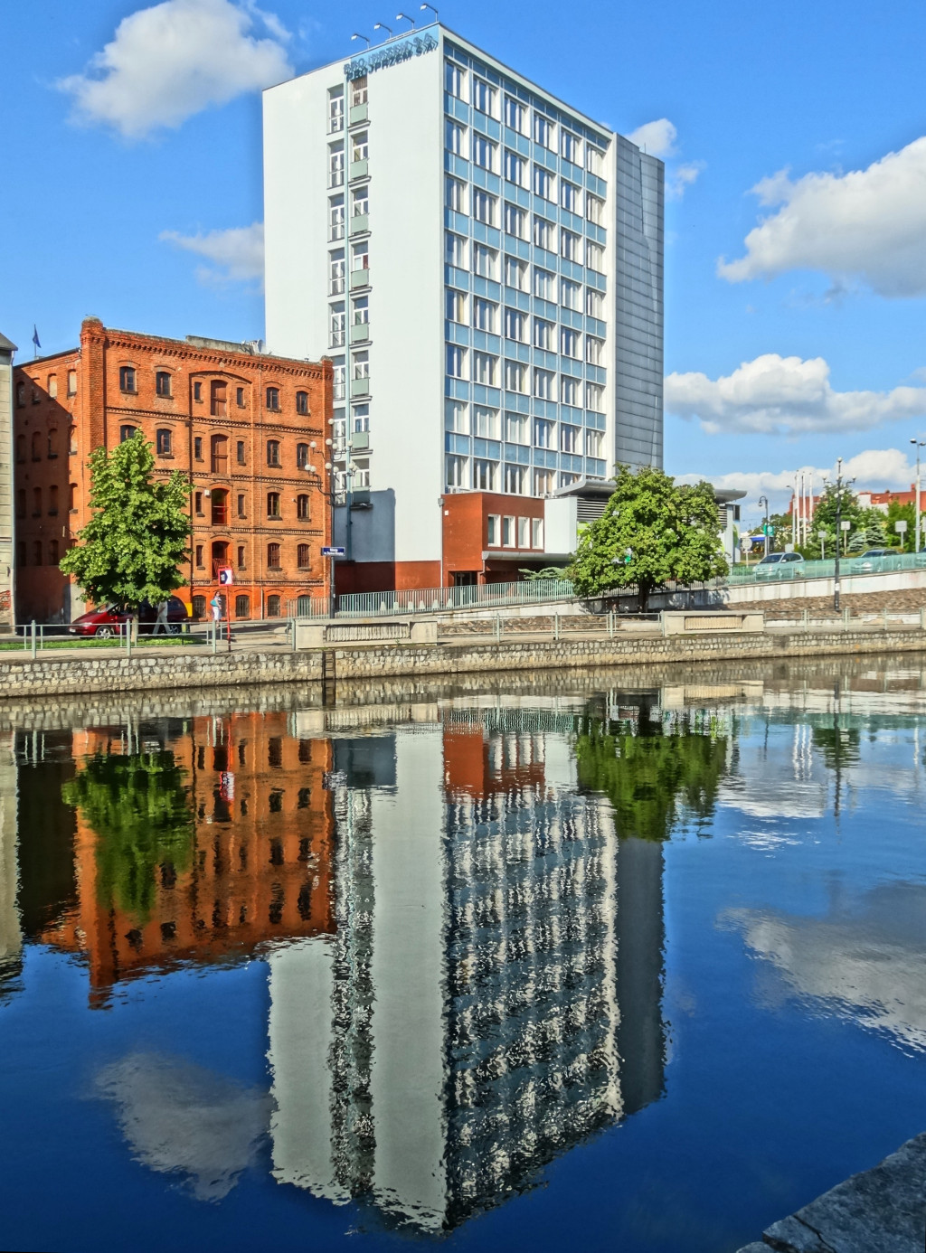 Biurowiec Projprzem S.A. na północnym nabrzeżu Brdy w Bydgoszczy